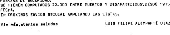 Fragmento del informe de Arancibia Clavel, Julio 1978, Archivo de la Camara Federal de Buenos Aires, Argentina